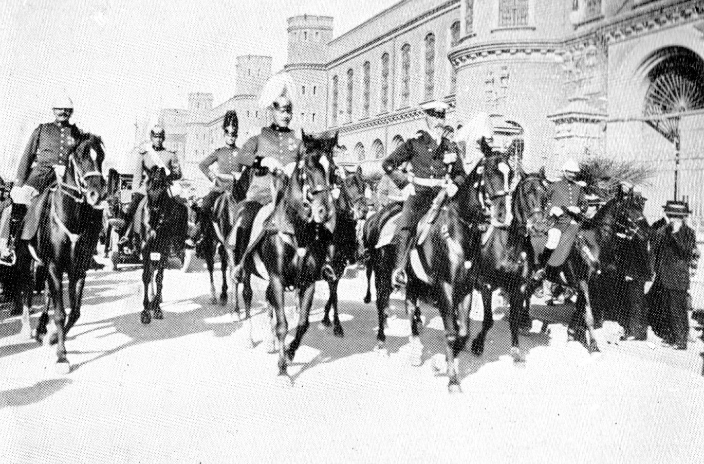 Prinz Heinrich von Preußen (Bildmitte in Marineuniform) in Santiago de Chile Anfang April 1914 anläßlich des Besuchs von drei Schiffen der Kaiserlichen Marine in Chile